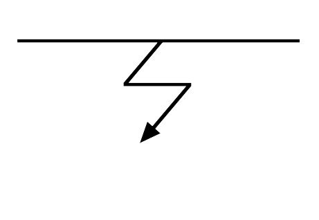 Schématická značka zkratu.